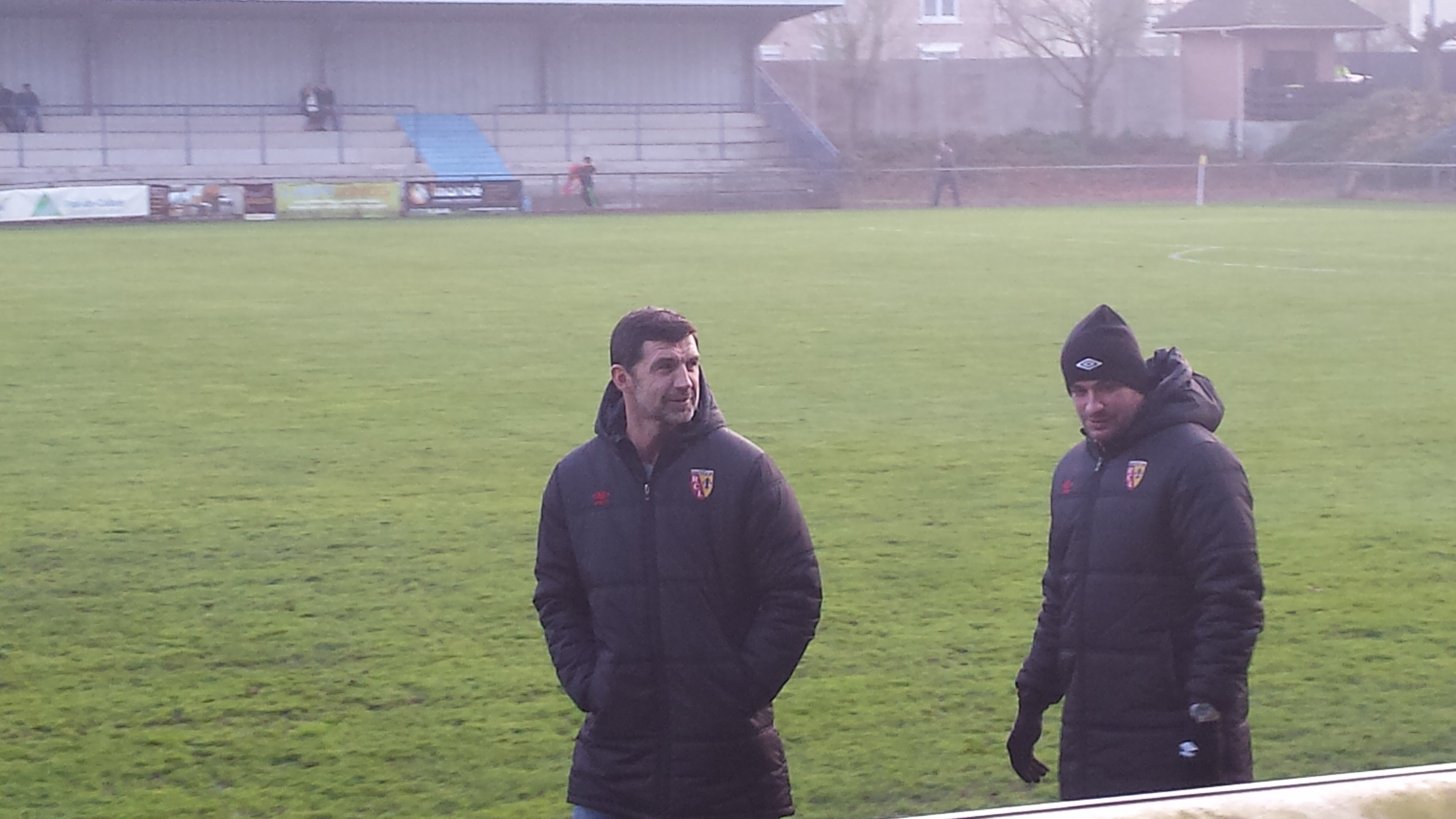 Eric Sikora (à gauche), entraîneur de la réserve du RC Lens, et Daniel Moreira (à droite), entraîneur adjoint.